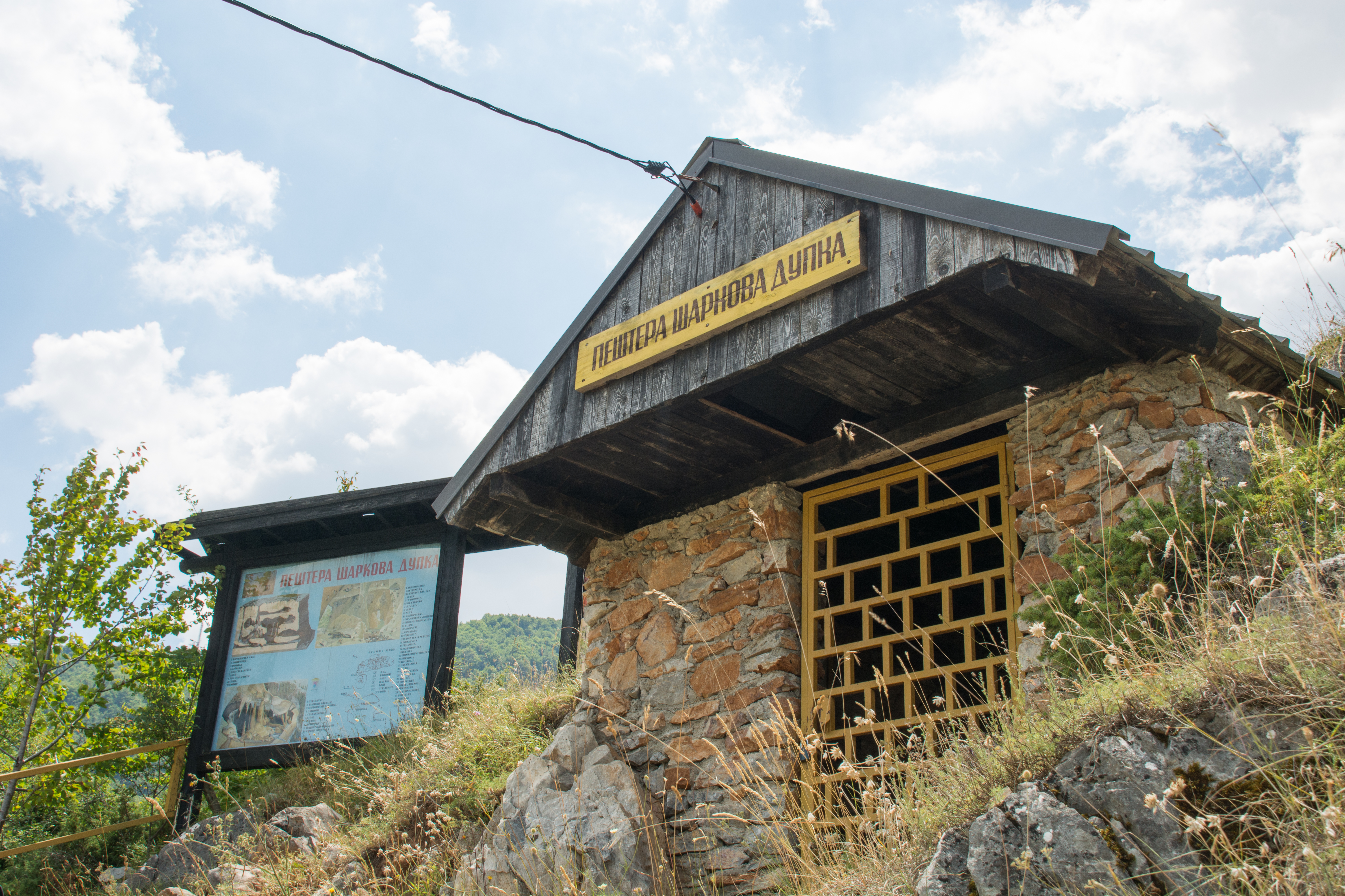 Влезна врата на пештерата и поставена табла со мапа, која ги објаснува пештерските украси и богатиот животински свет.